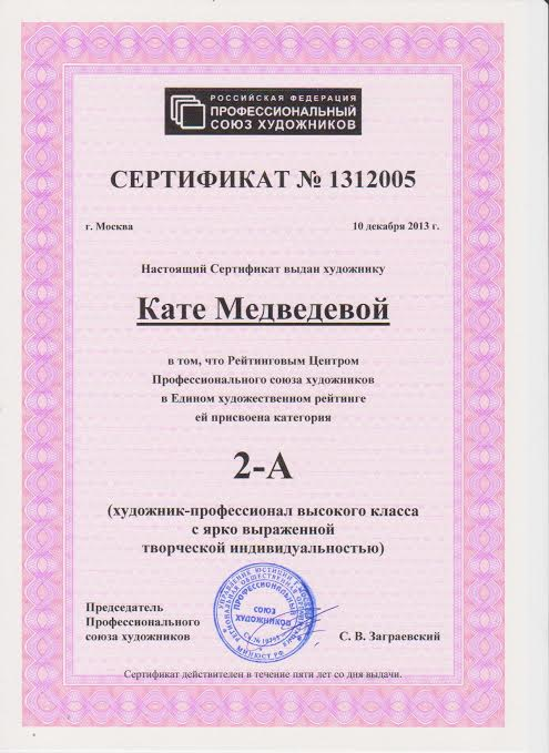 Сертификат № 1312005 выдан художнику Кате Медведевой в том, что Рейтинговым Центром Профессионального союза художников в Едином художественном рейтинге ей присвоена категория 2-А (художник-профессионал высокого класса с ярко выраженной творческой индивидуальностью)